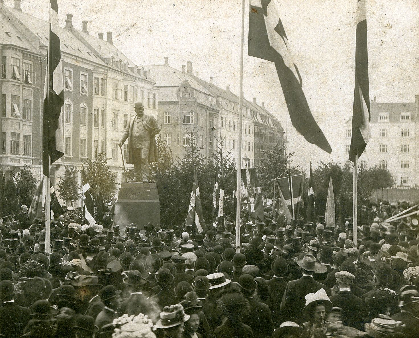 Afsløring af Aksel Hansens (1853-1933) statue af Hans Broge